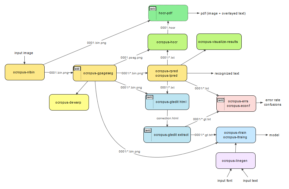 Workflow der einzelnen Kommandozeilen-Tools von der freien Texterkennungssoftware OCRopus. Man sieht, welche Tools man in welcher Reihenfolge braucht, um beispielsweise von einem Eingangsbild zu einem PDF mit hinterlegten Text zu kommen.